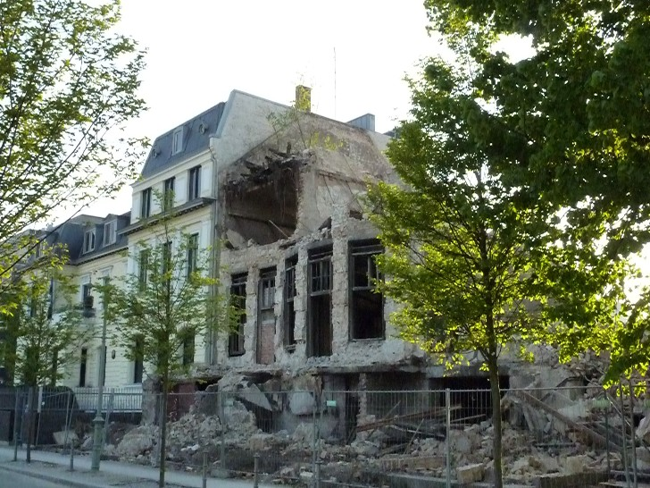 Abrissarbeiten an der ehemaligen Griechischen Botschaft in der Hildebrandstr. 4 in Berlin-Tiergarten